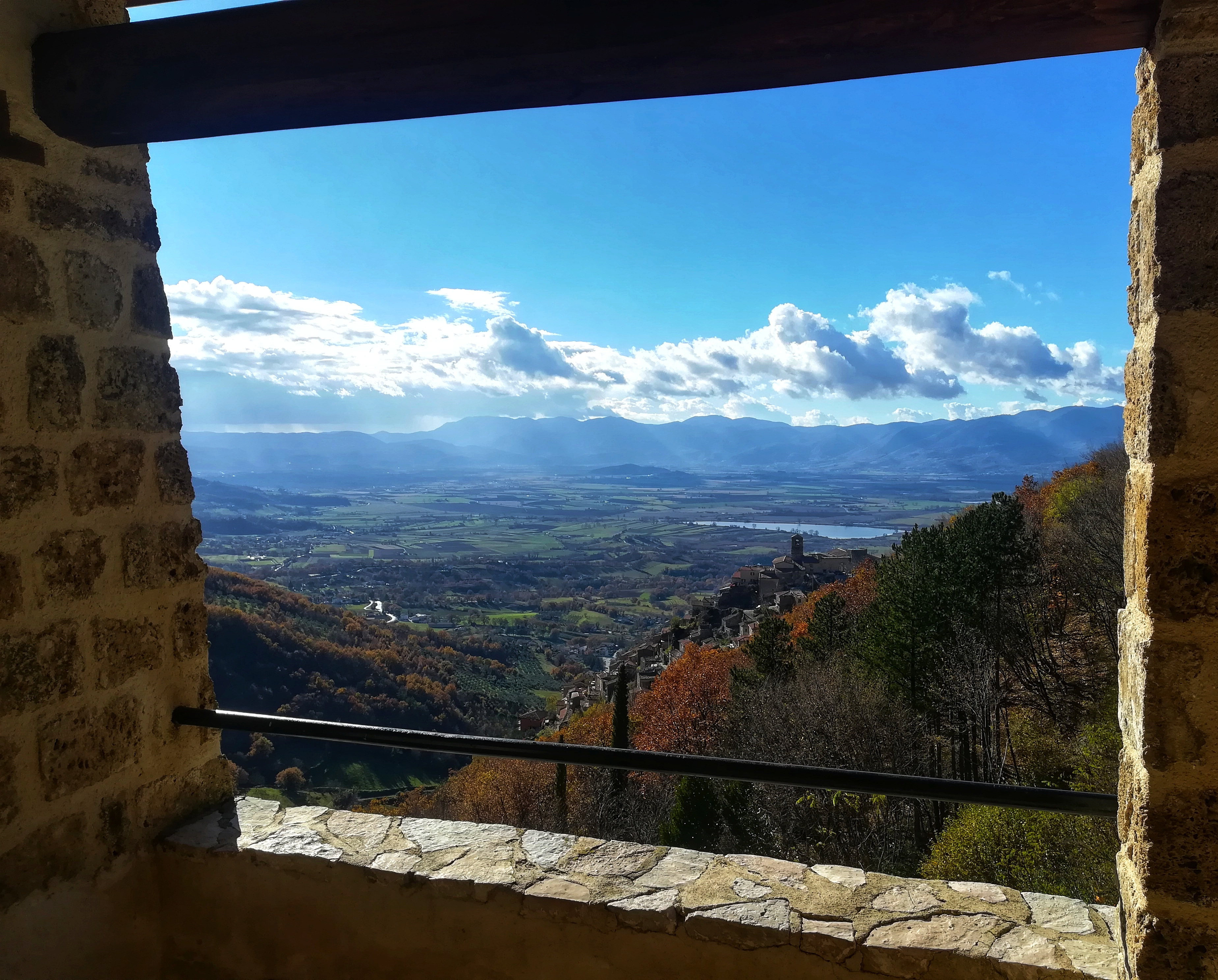 santuario di Poggio Bustone This is a photo of a monument which is part of cultural heritage of Italy. Questa è una foto di un bene culturale italiano che partecipa al concorso Wiki Loves Valle del Primo Presepe 2019, gestito in coperazione con Wikimedia Italia. This is a photo of a monument which is part of cultural heritage of Italy. This monument participates in the contest Wiki Loves Valle del Primo Presepe 2019, operated in cooperation with Wikimedia Italia.